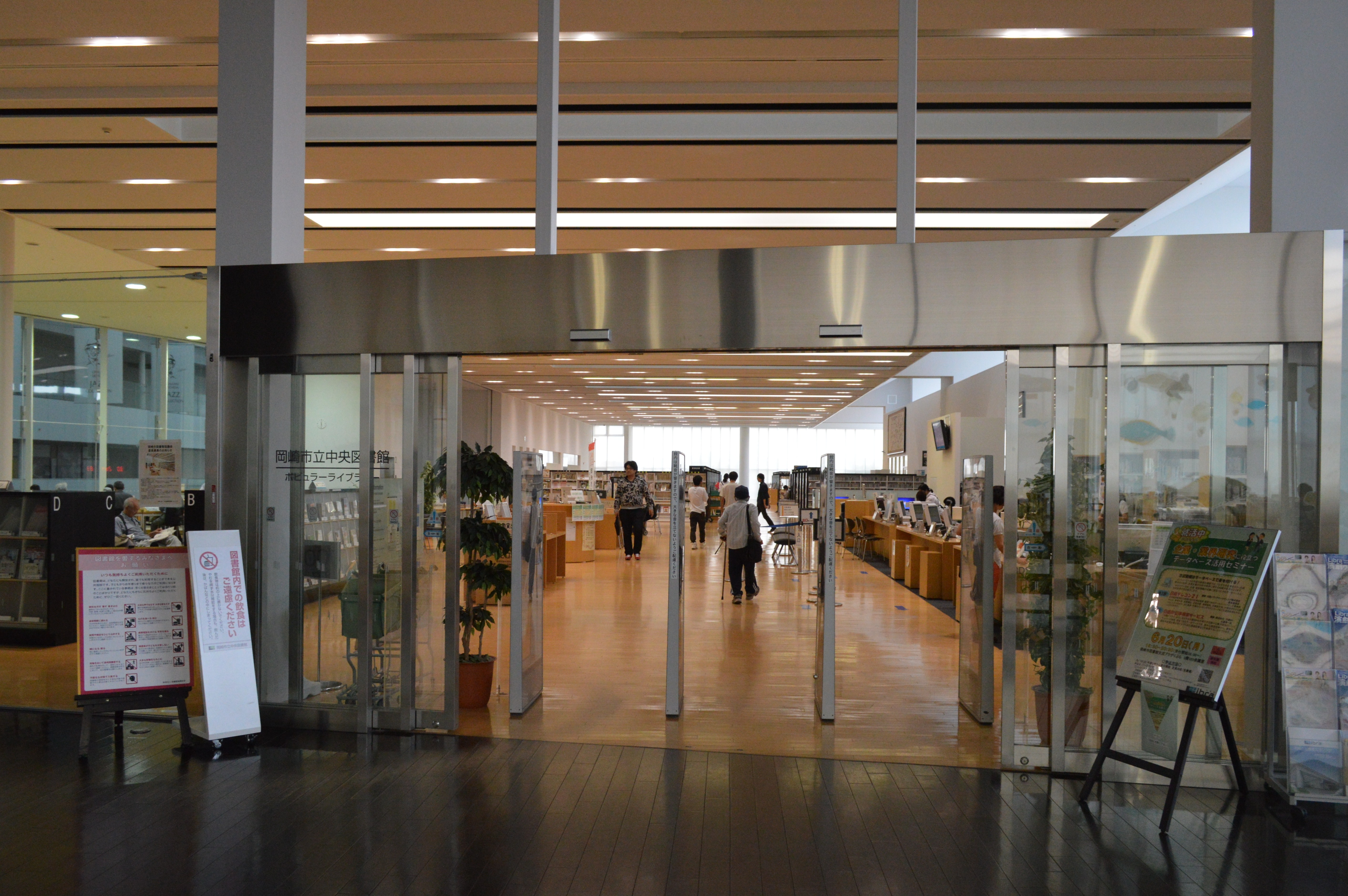 岡崎市図書館交流プラザにある岡崎市立中央図書館の入口。